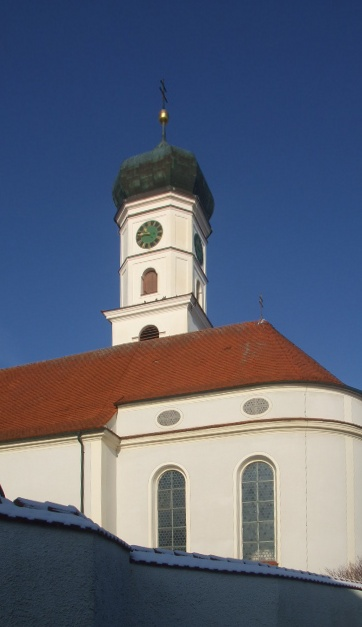 Pfarrkirche St. Sebastian, Reichenbach, Bad Schussenried Turm